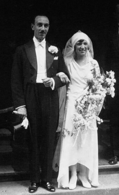 Mariage de Mlle Jolly et de Mr Brunet, champion du monde de figures : [photographie de presse] / Agence Meurisse